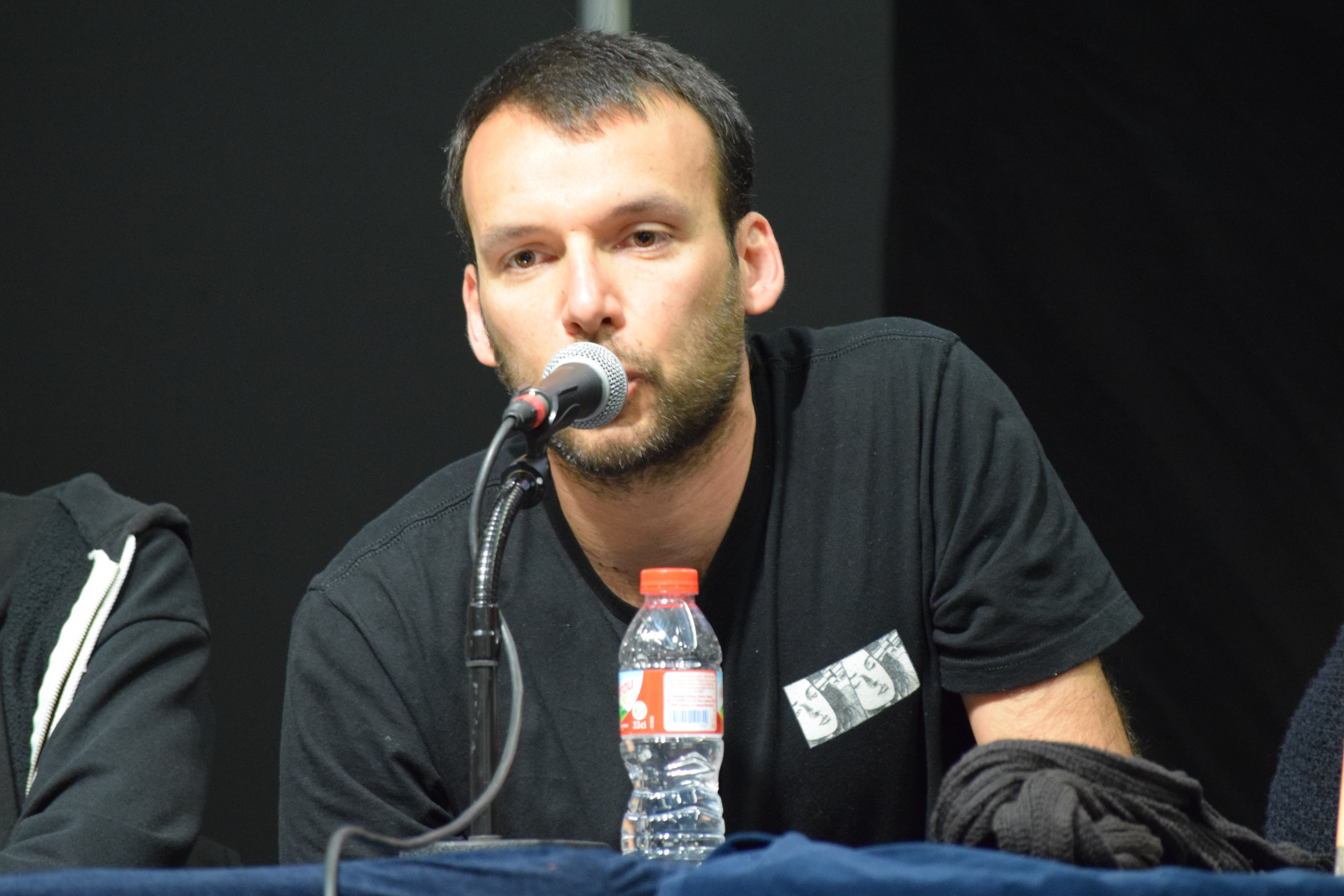 Rayco Pulido durant la presentació del còmic “Lamia”, nominat al premi a la millor obra. Saló Internacional del Còmic de Barcelona de 2017. Divendres 31 de març de 2017.